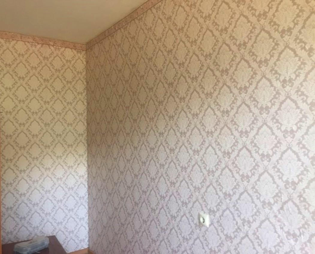 Wallpaper on the wall of the apartment